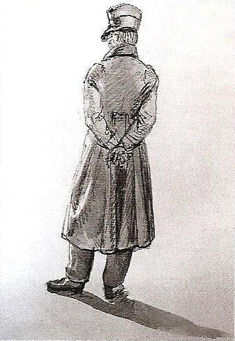 Caspar David Friedrich Rückenfigur (Ausschnitt)